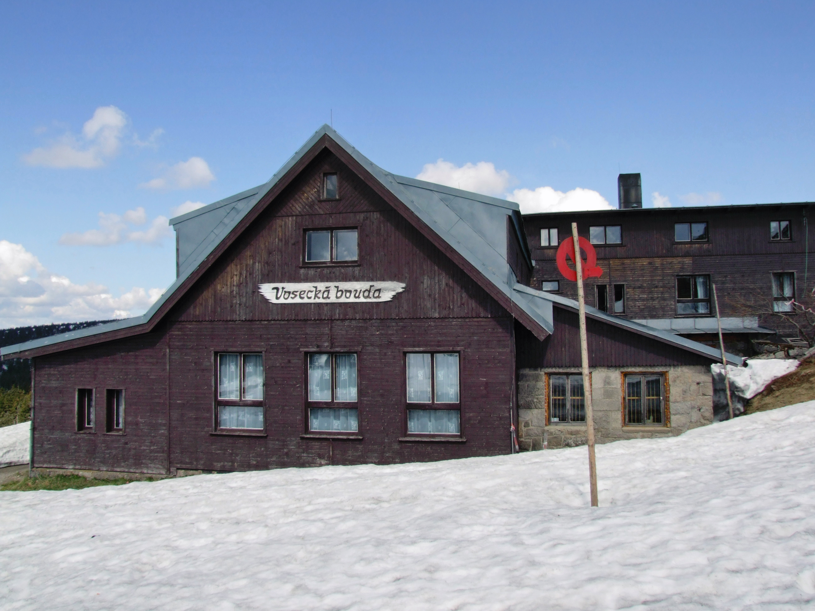 Vosecká bouda (Wossecker Baude) - hostel in Krkonoše, Sudetes